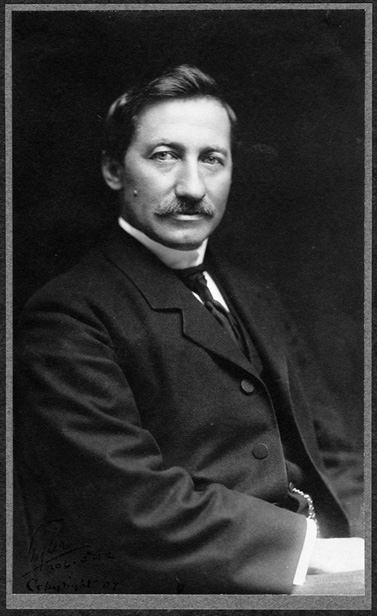 Frederick Cook nel 1909